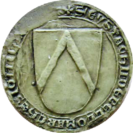 cf le titre.